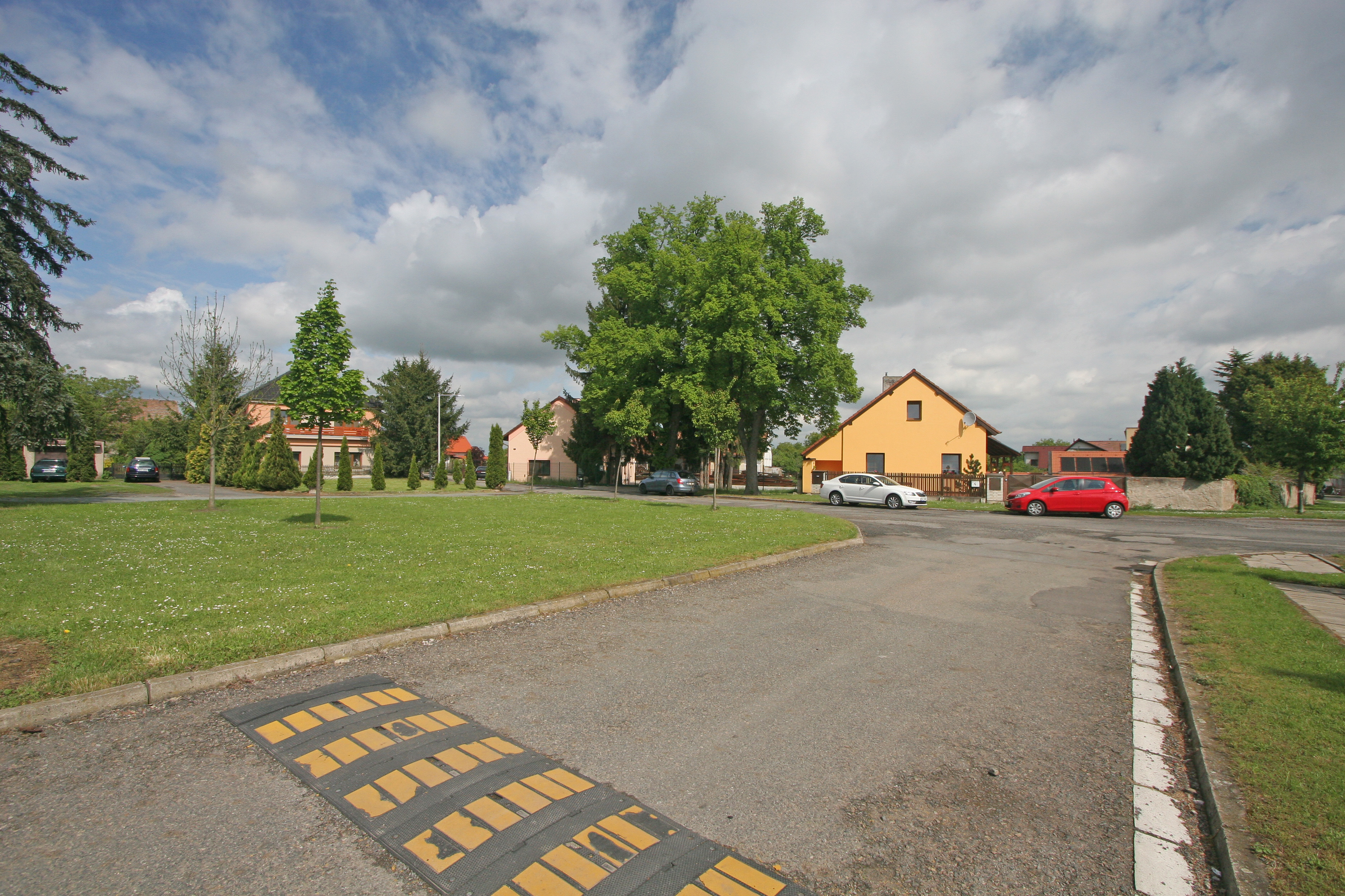 Staré Jesenčany náves